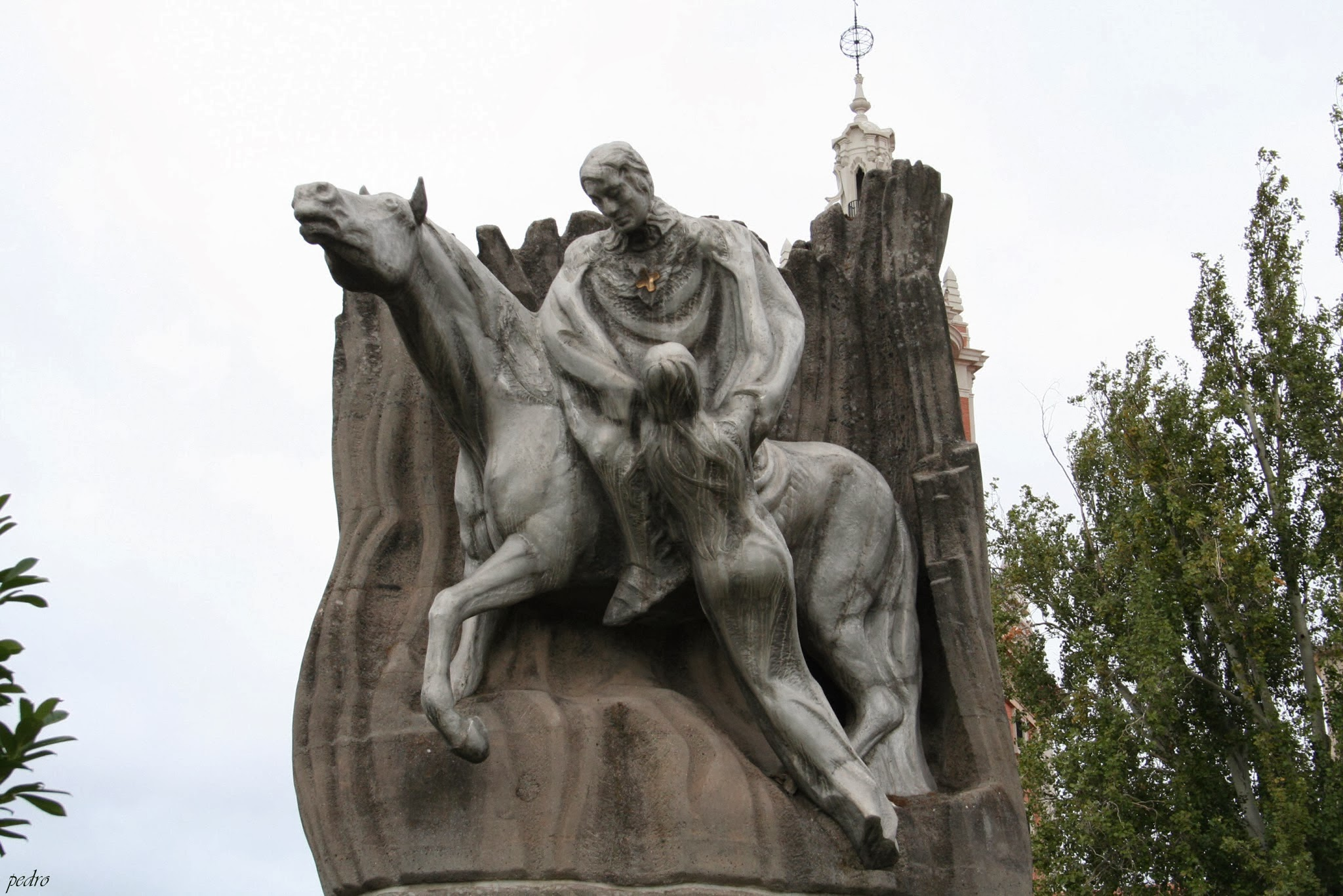 Monumentos Varios Ciudad Universitaria-Madrid (3)